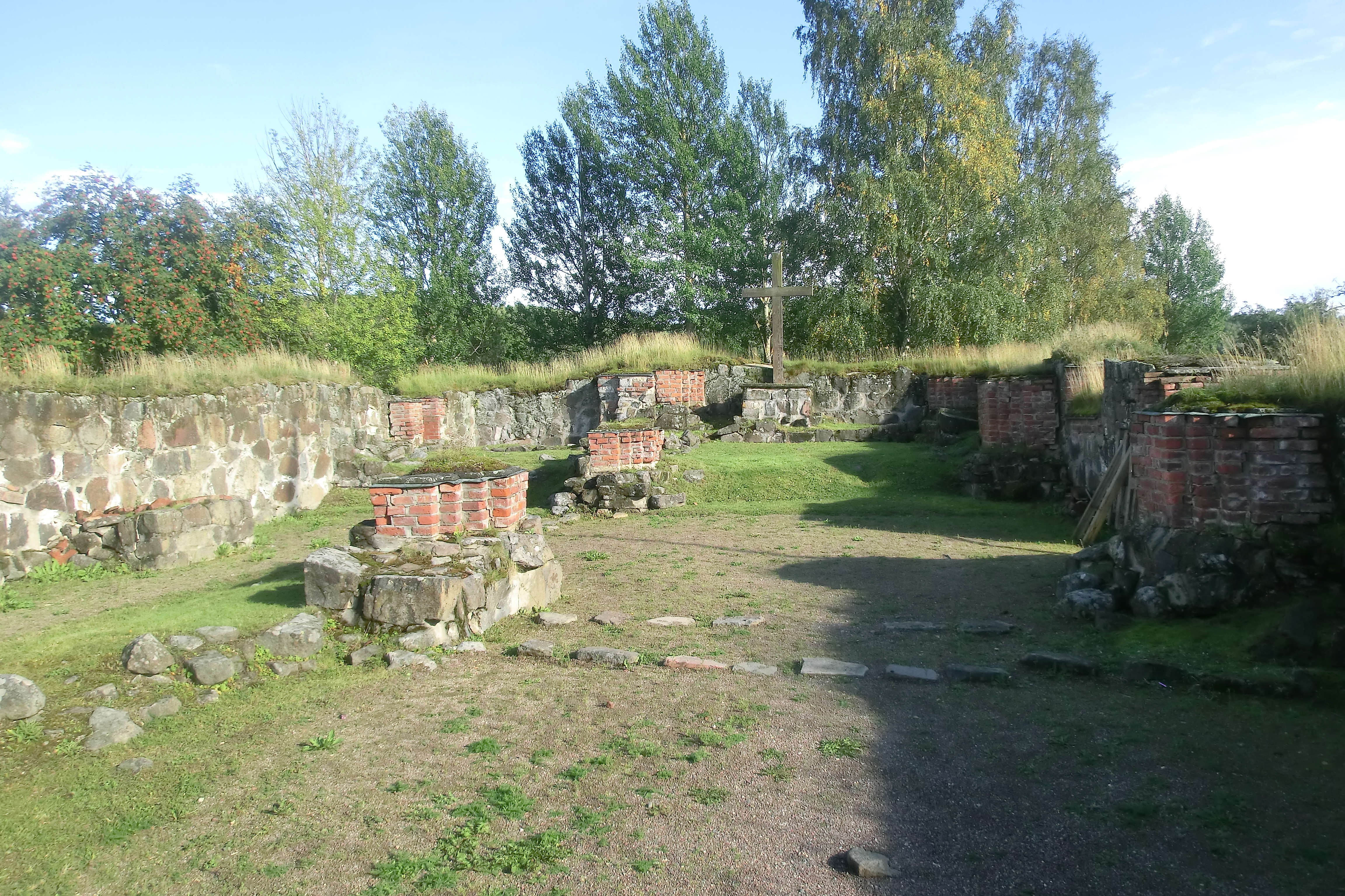 Nordingrå kyrkoruin